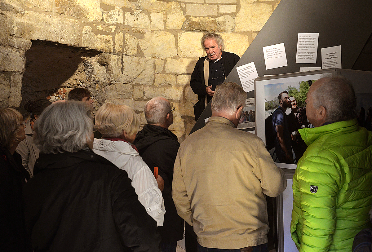 Der Fotograf Joachim Giesel, hier im Beginenturm in Hannover während seiner Führung durch seine dortige Ausstellung Fotografieren heute - vom Zauber der Bilder. Die Ausstellung vom 2. Oktober 2016 bis zum 8. Januar 2017 zeigt insbesondere Schnappschüsse von Menschen, die selbst gerade Fotos aufnehmen ...